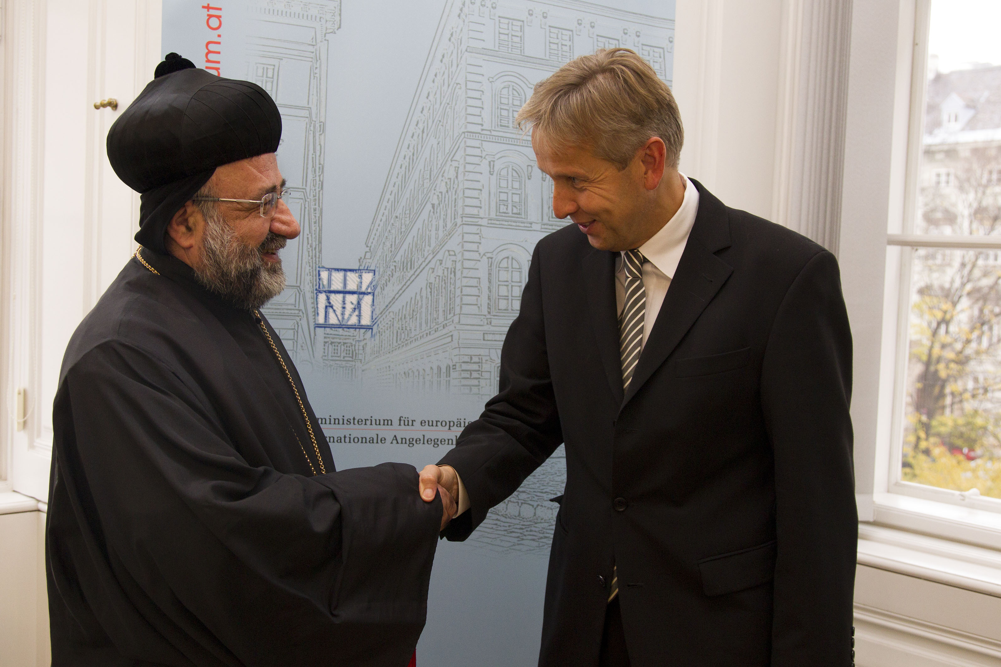 Staatssekretär Reinhold Lopatka (R) und Erzbischof Mar Gregorios Yohanna Ibrahim, Syrisch-Orthodoxe Kirche von Aleppo (L). Foto: Mahmoud